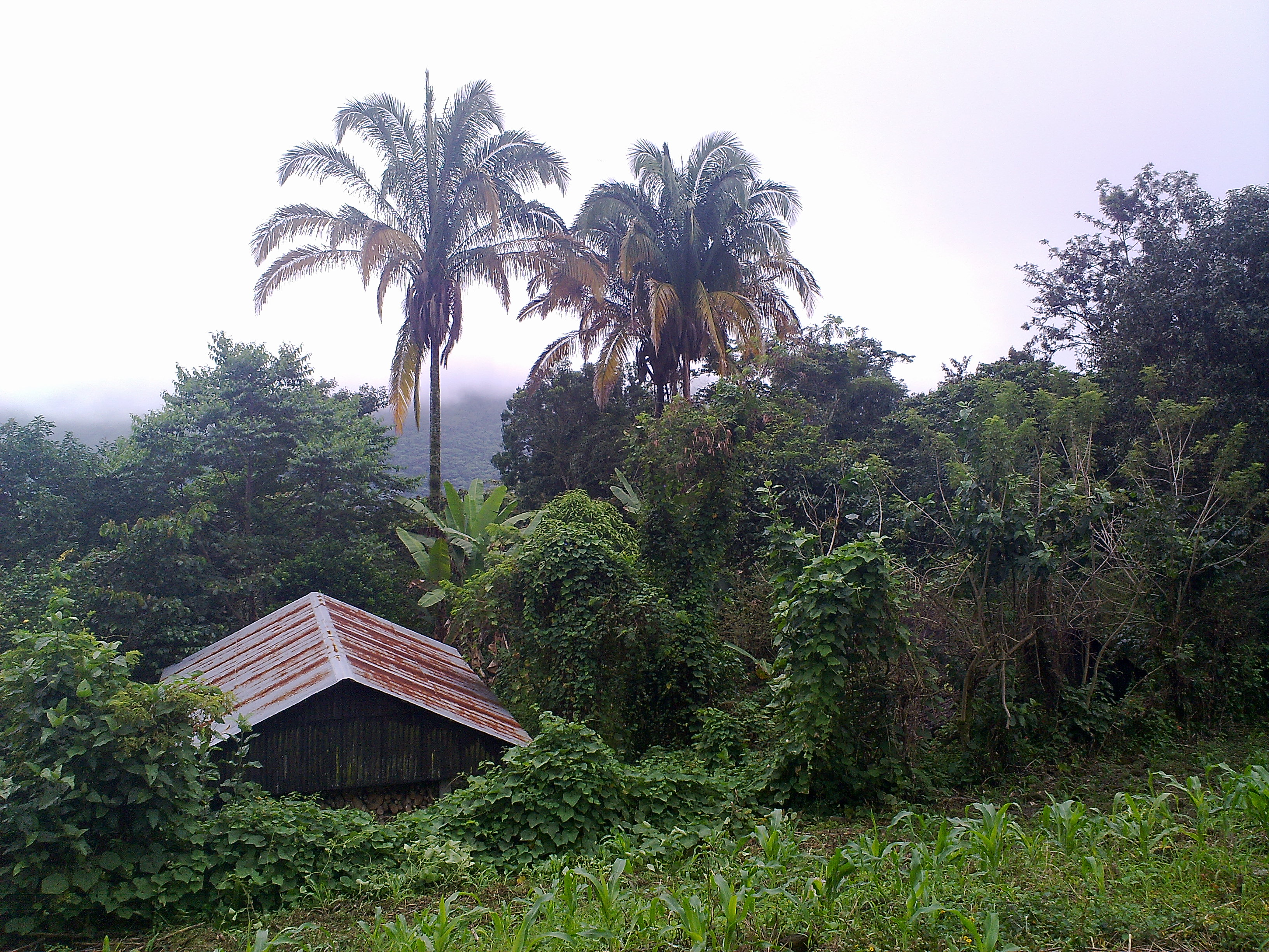 Casa de lámina en la Sierra de Tenango estado de Hidalgo